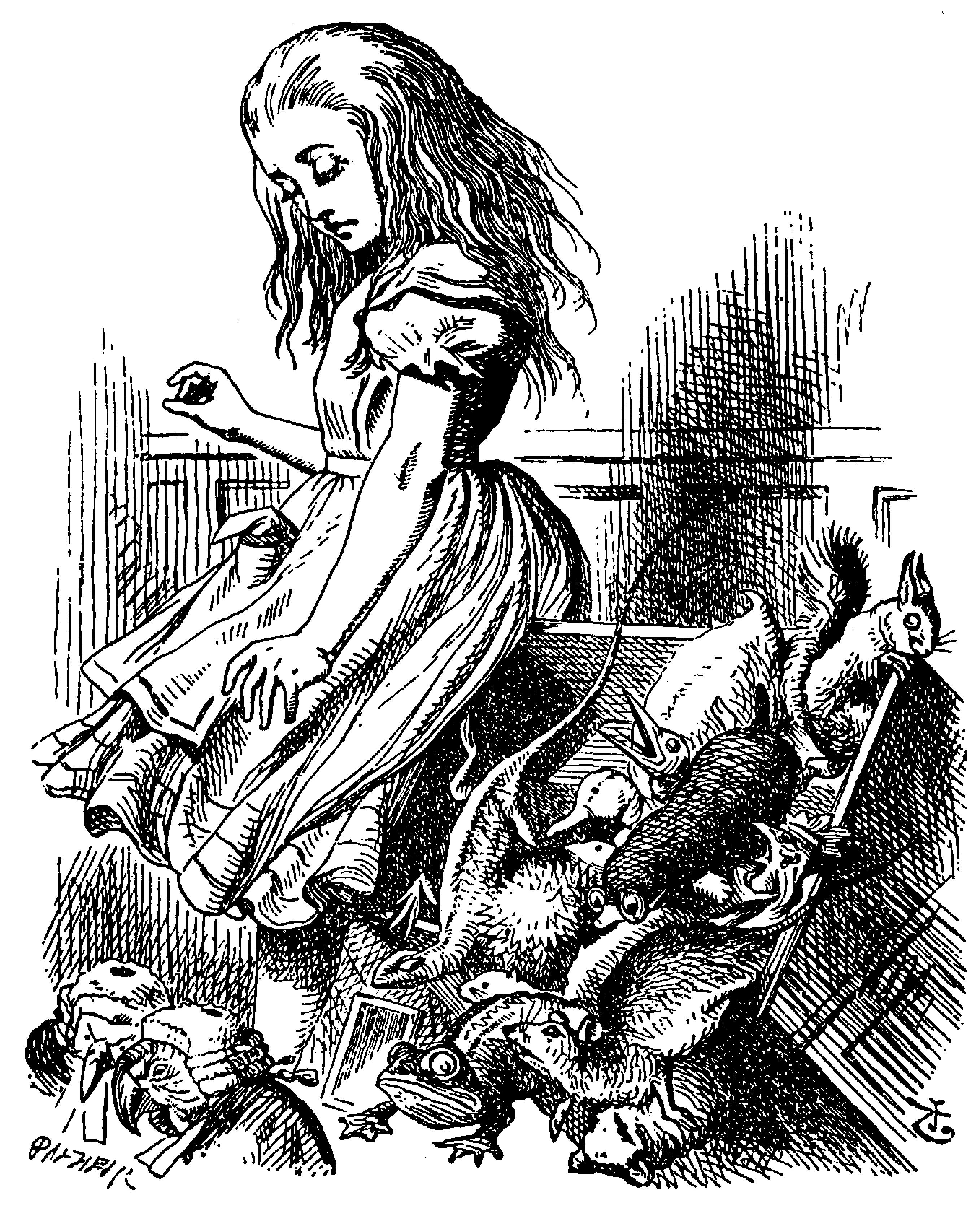 Alice’s Abenteuer im Wunderland Übersetzer: Antonie Zimmermann Orginal Titel: Alice's Adventures in Wonderland Illustrationen: John Tenniel